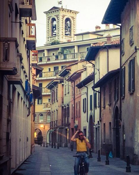 Torre civica di Chiari vista da una via del centro storico